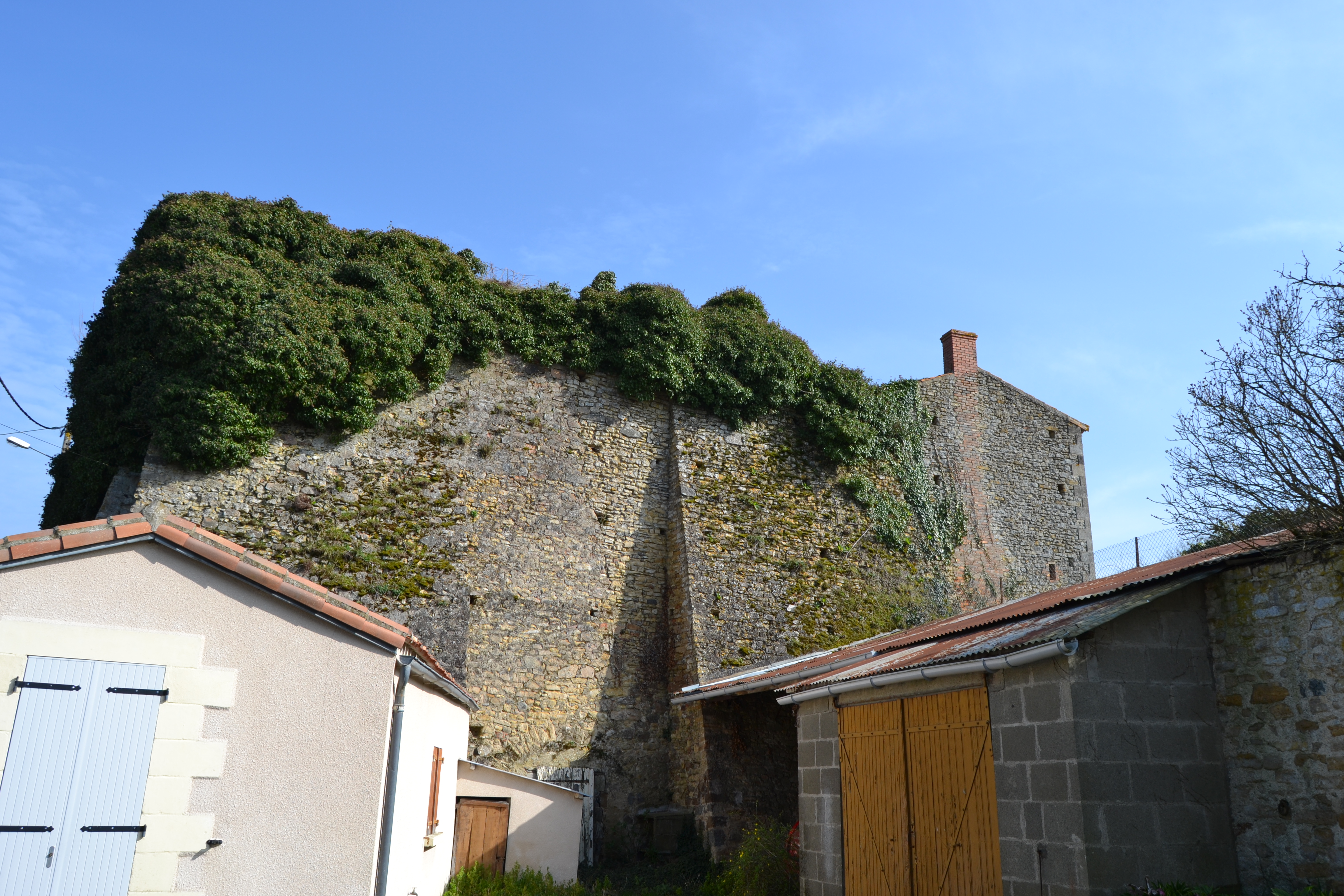 Façade Ouest du Four à Chaux, rue de l'ecole à Glenay (79)